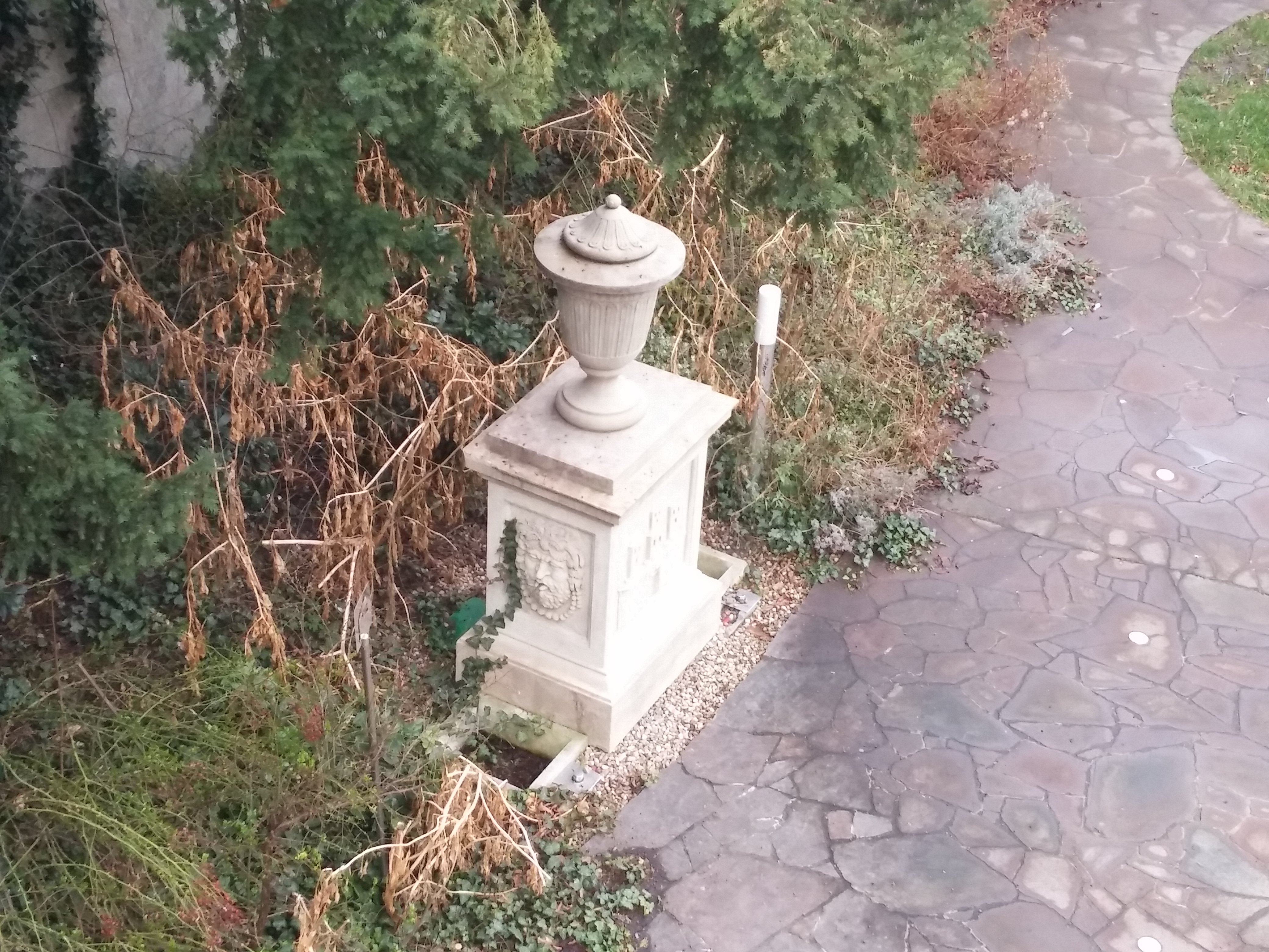 Fontána, Michalská priekopa, Staré Mesto, Bratislava